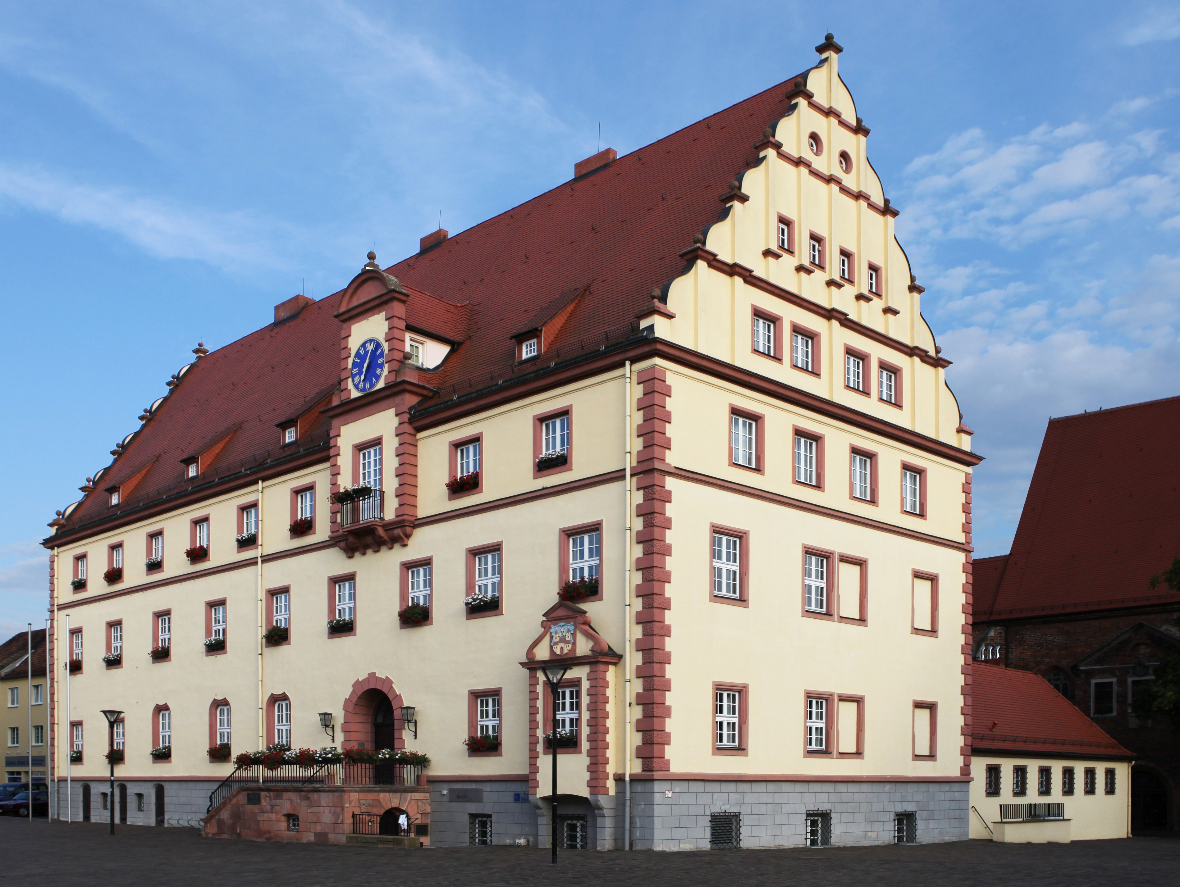 Kulturdenkmal Rathaus Eilenburg am Marktplatz 1; Objektnummer: 08973430